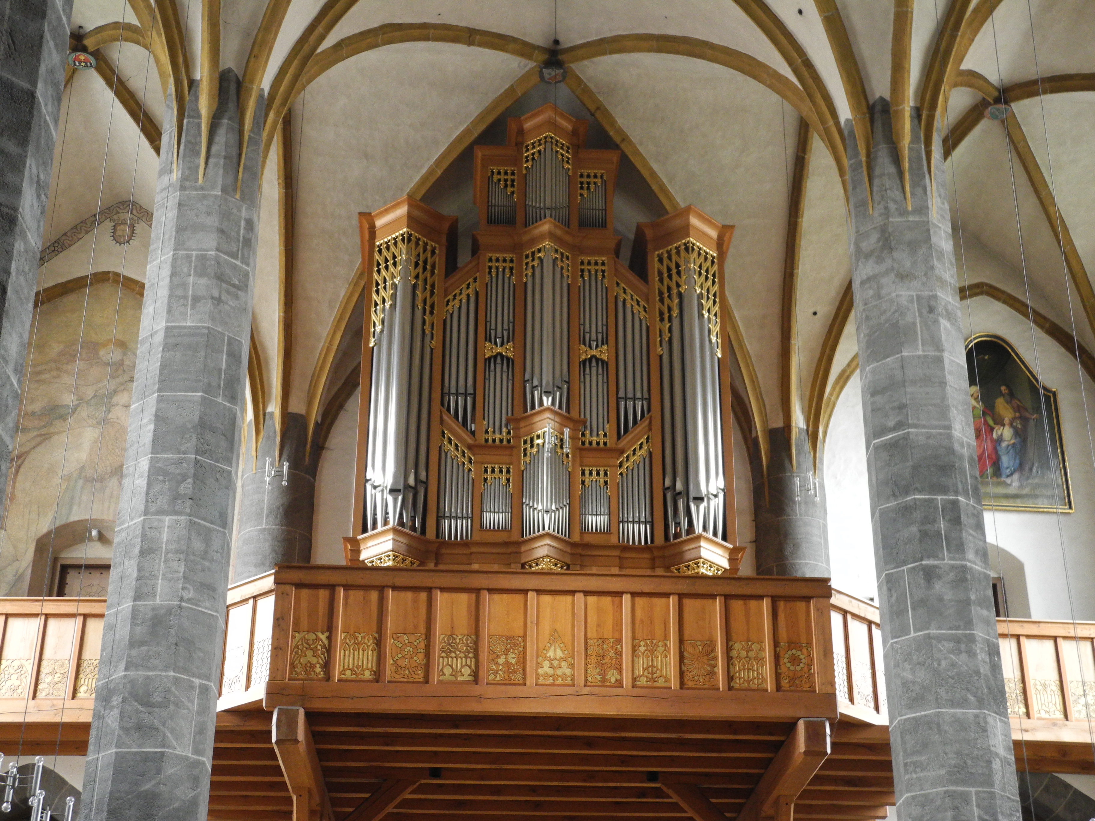 Manfred Mathis (+ 19. April 2013) ist hier 1982 ein großer Wurf geglückt! (43-III-P)